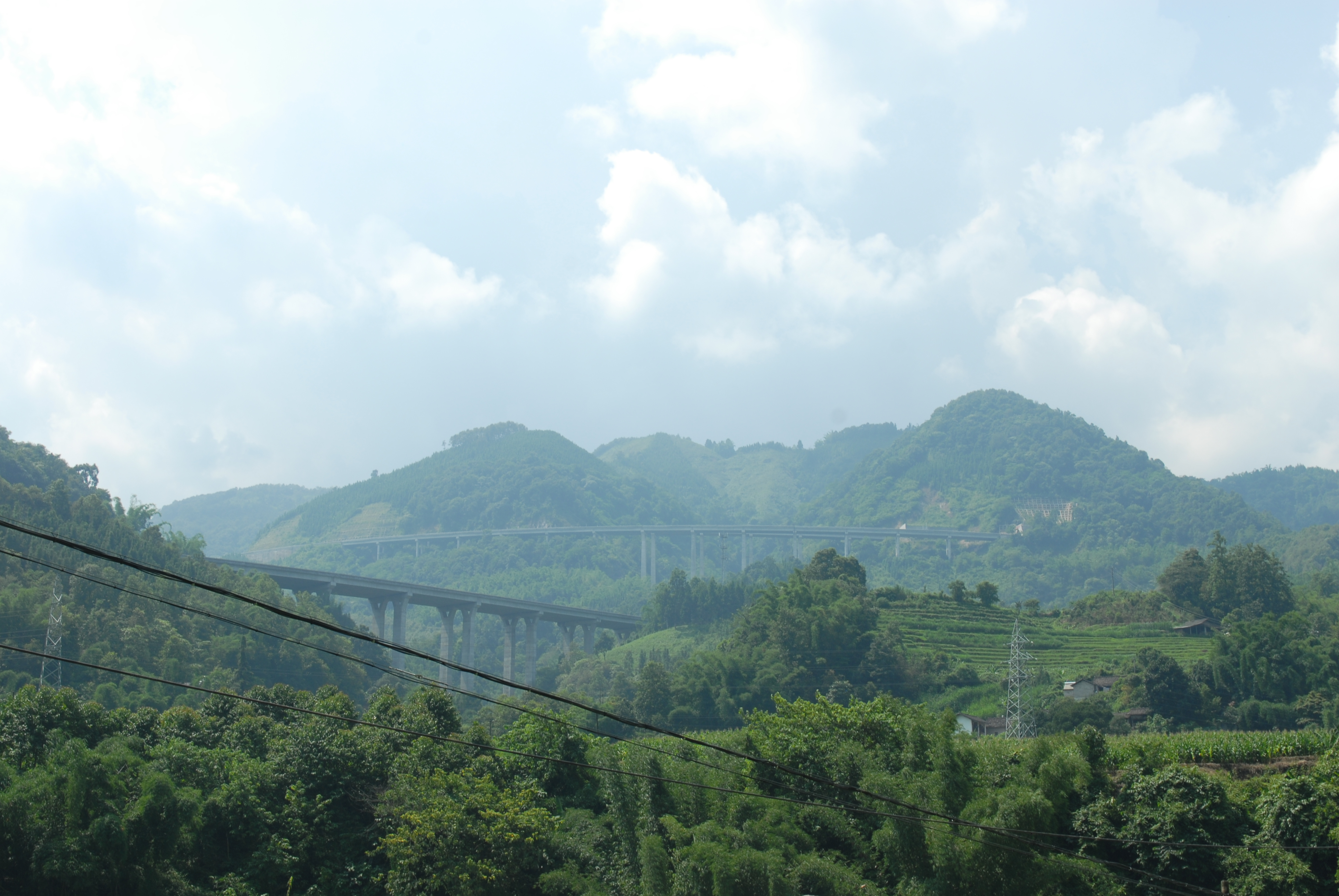 龙瑞高速芒市段